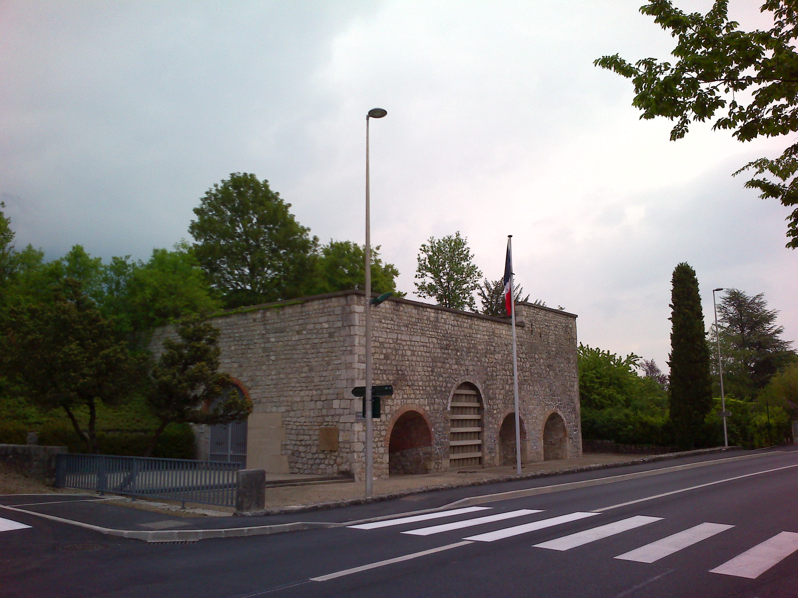 Ancien four à chaux et charbon devenu un tombeau